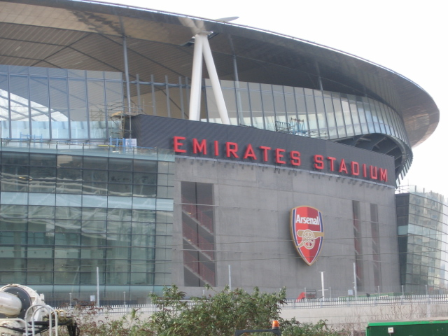 Billede taget af mig, London Februar 2006, Stadionet var ikke færdig bygget på det tidspunkt